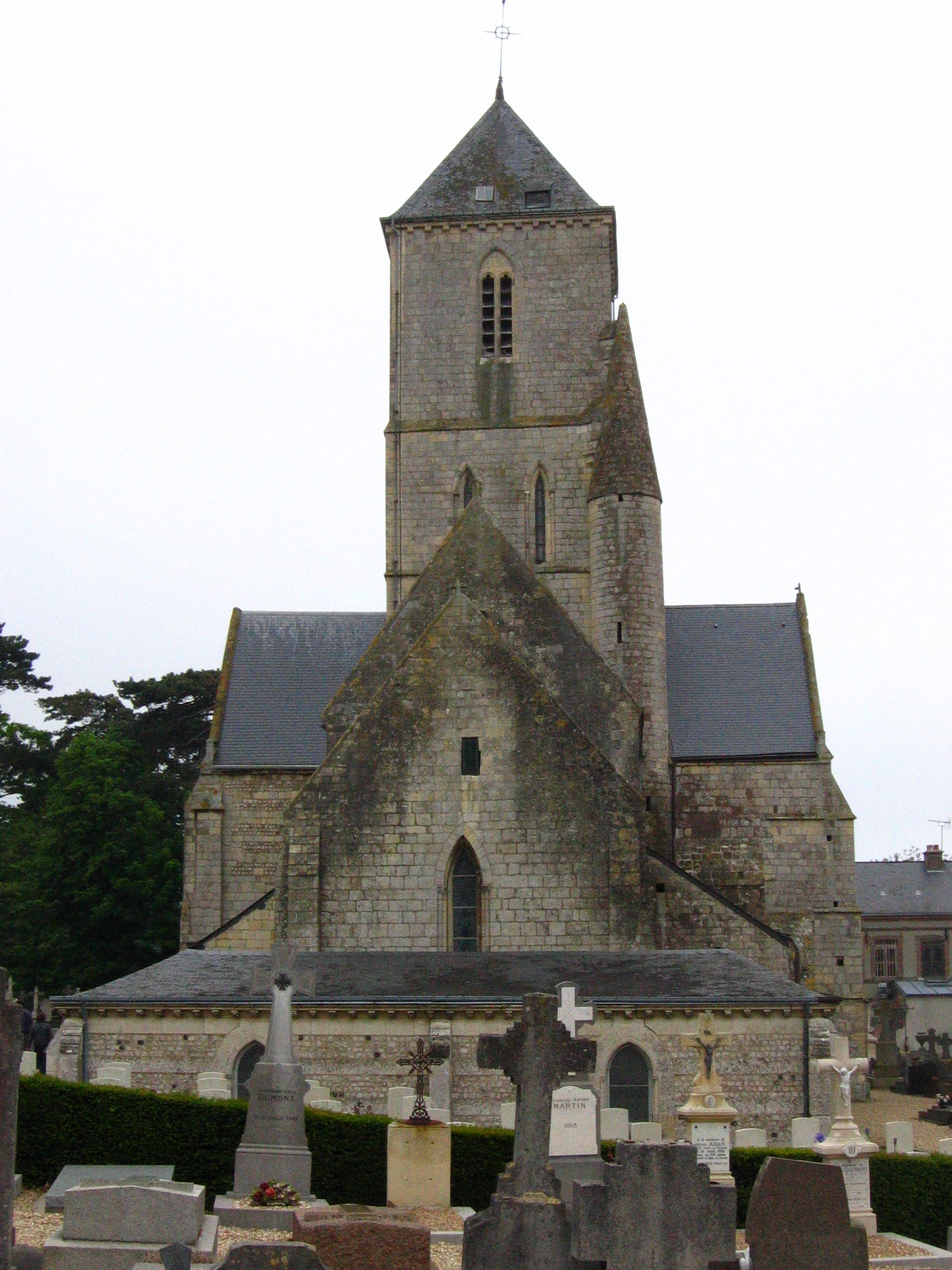 Notre-Dame d'Étretat, chevet, Étretat, France.